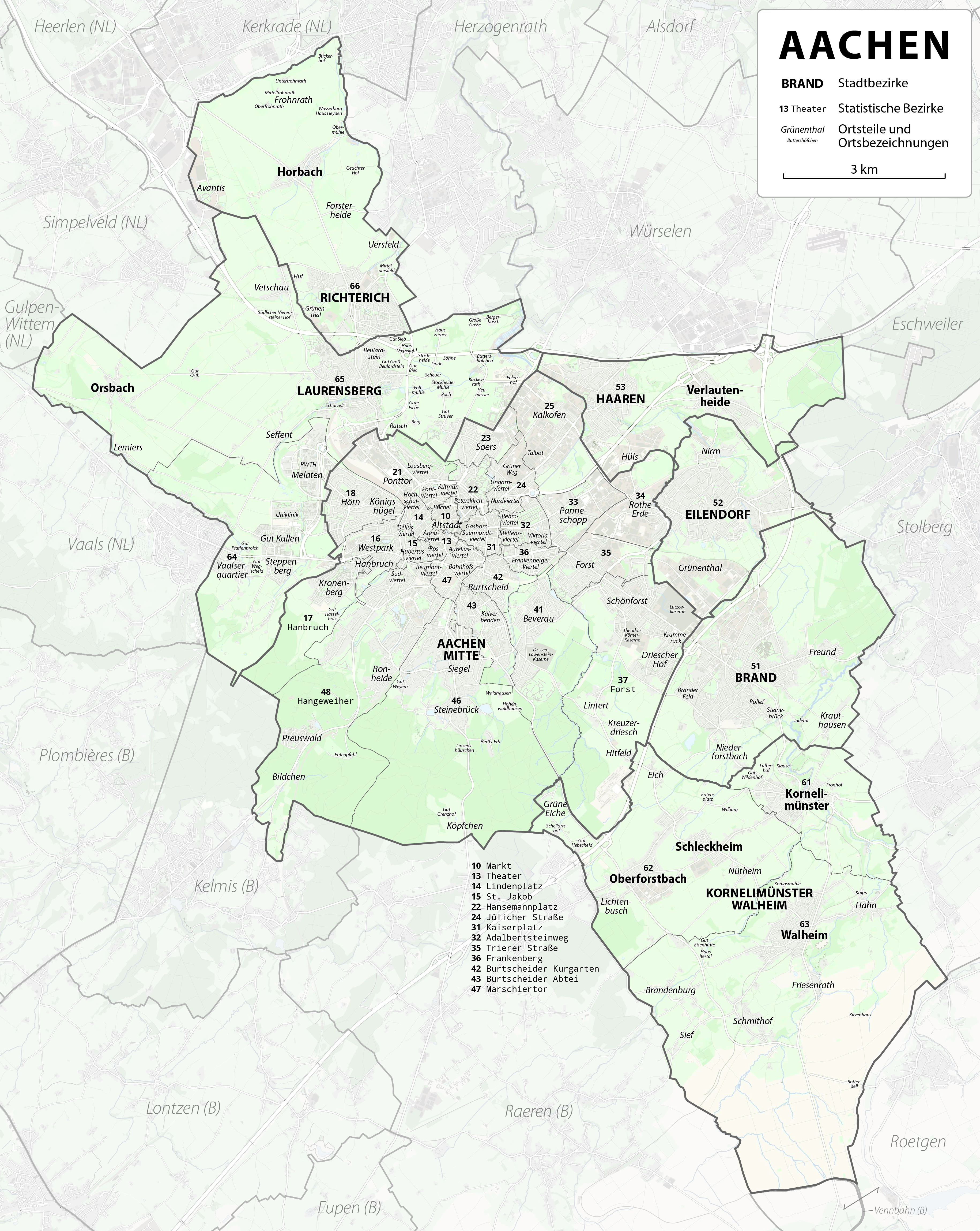 Entwurf für eine Karte der Stadtbezirke von Aachen